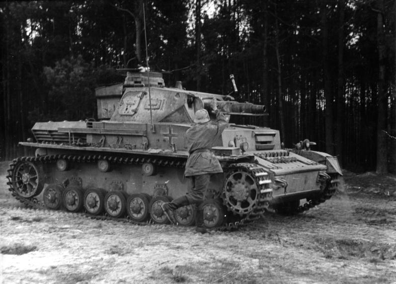 Ausbildung, Panzerbekämpfung Scherl Bilderdienst Ausbildung bei der Panzergrenadier-Division "Großdeutschland", die sich überwiegend aus Freiwilligen aus allen Gauen des Reiches zusammensetzt und die im Verlaufe dieses Krieges unsterblichen Ruhm an ihre Fahnen geheftet hat. Besonders sorgfältig und vielseitig ist die Ausbildung des Ersatzes für diese Kerntruppe, die bei der Ersatzbrigade "Großdeutschland", dem Heimattruppenteil der ruhmreichen Division, erfolgt. UBz.: Panzer-Nahbekämpfung. Das Anbringen einer Sprengladung am fahrenden Panzer. Foto: Schwahn 5.11.43 5558-43 [Deutschland, Ausbildung bei der Ersatzbrigade der Panzergrenadier-Division "Großdeutschland", Panzernahbekämpfung durch Handgranate an einem Panzer IV]